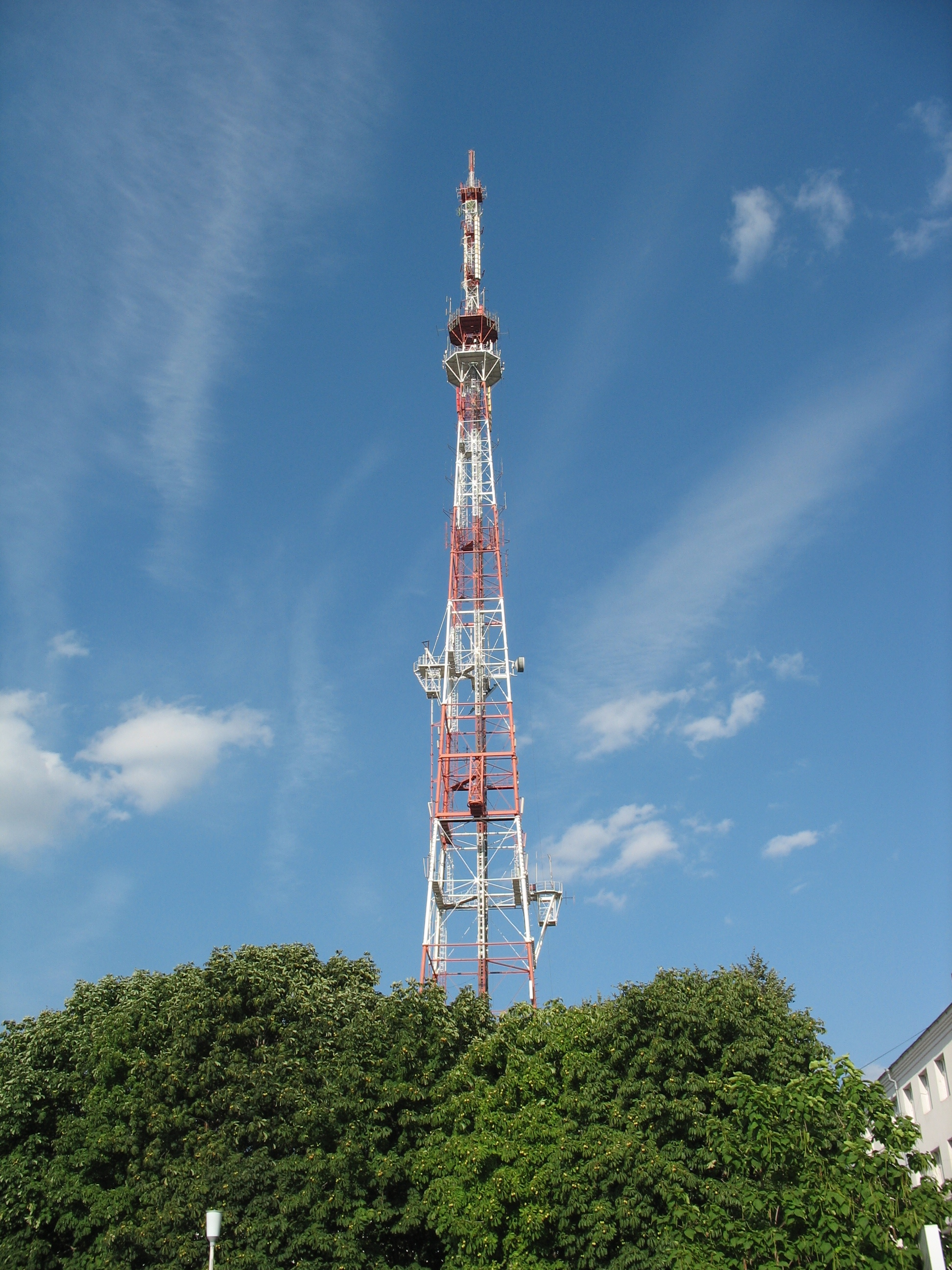 Телевышка в Воронеже